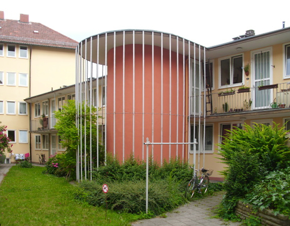 Hirschelgasse Innenhof mit Treppenaufgang